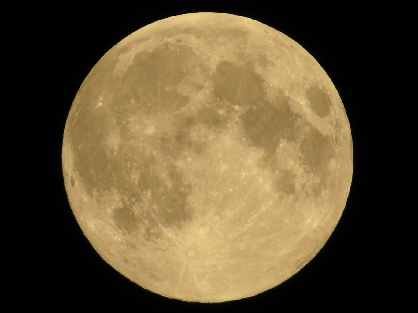 08.Sep.2014, Mid-Autumn Festival. 15. Tag des 8. Mondmonats nach dem traditionellen chinesischen Kalender. Das Mondfest / Mittherbstfest